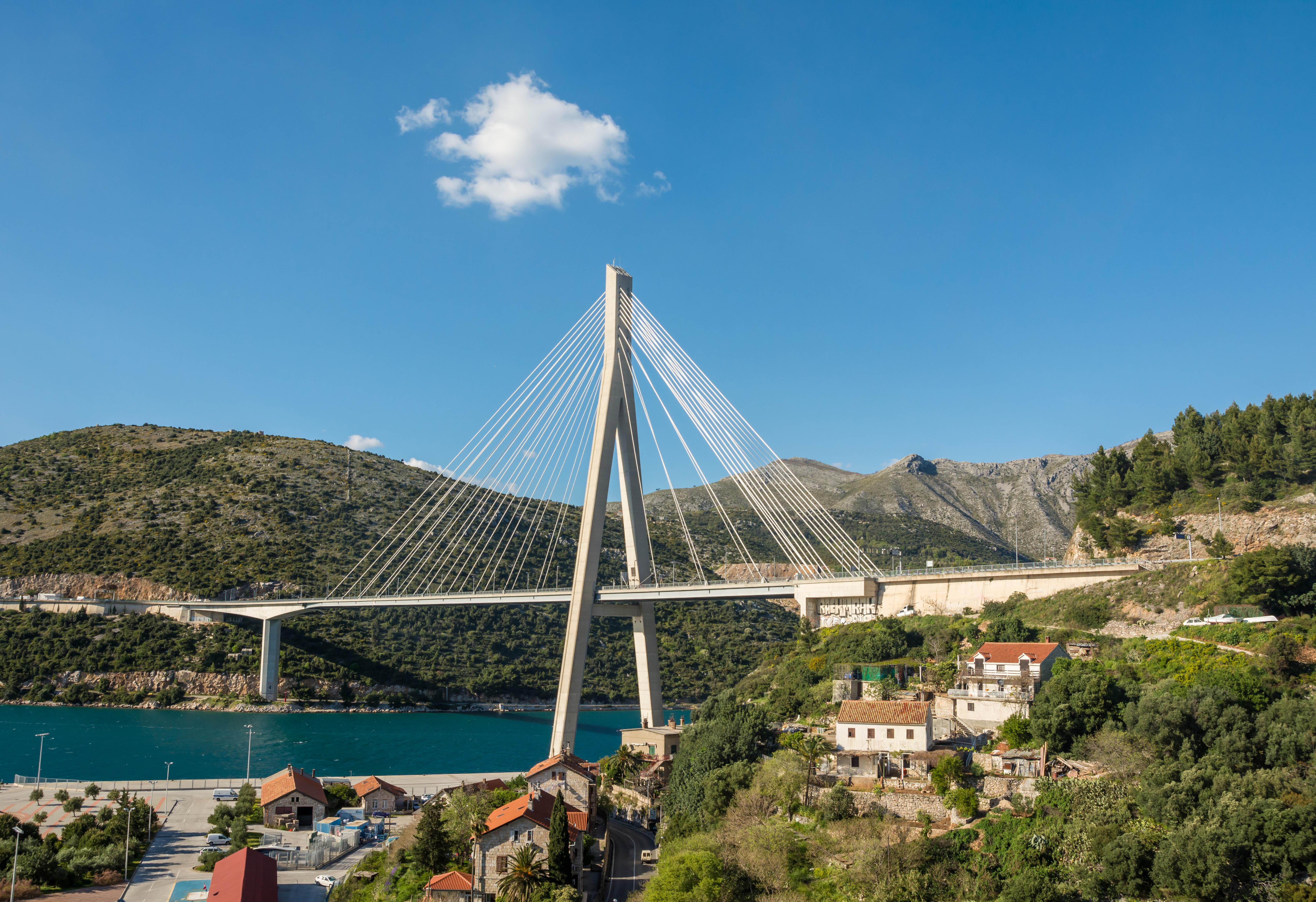 Die Franjo-Tuđman-Brücke in Dubrovnik (Kroatien).